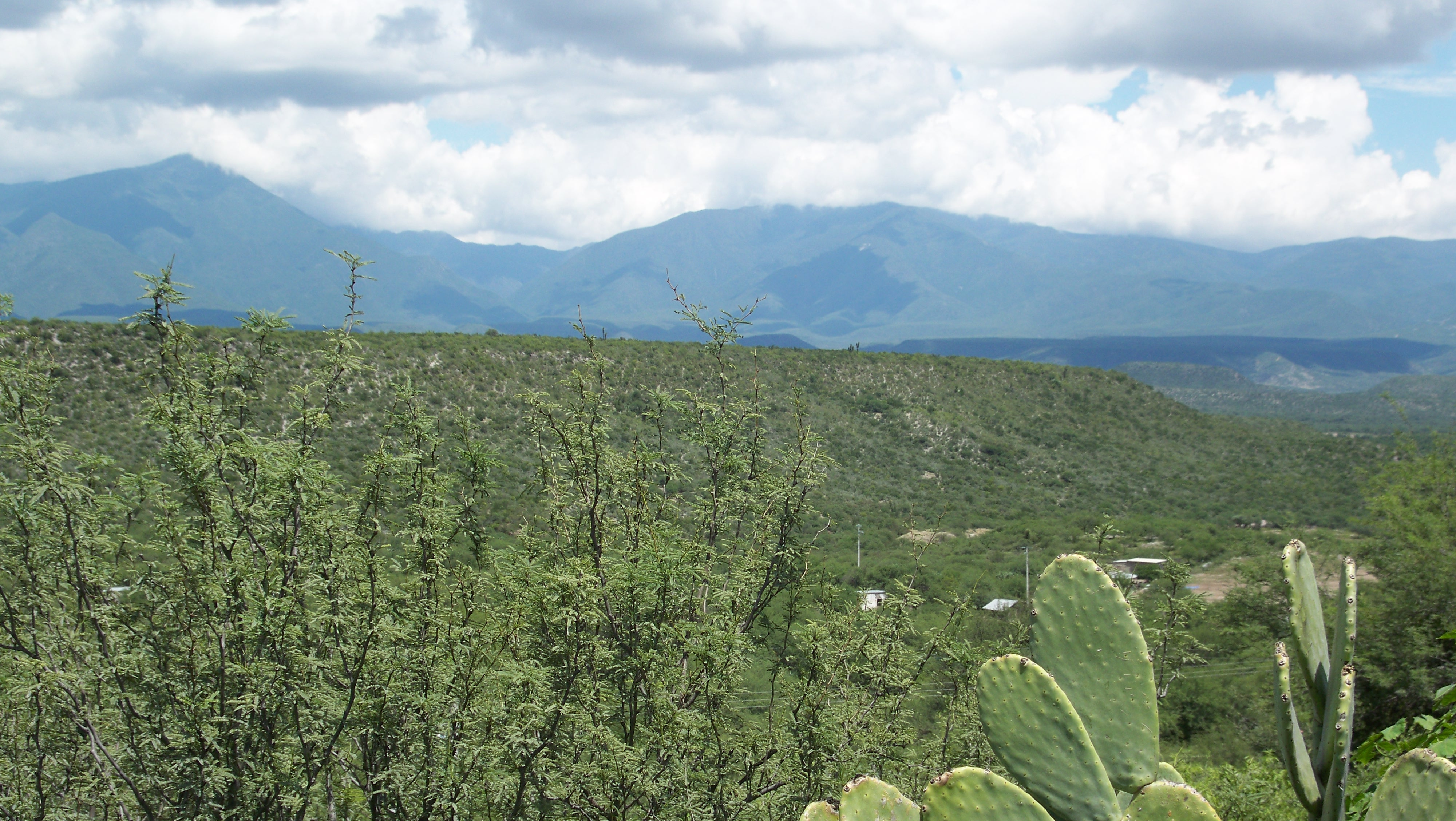 Una vista panorámica hacia la Sierra Madre Oriental - La Independencia Jaumave, Tam.